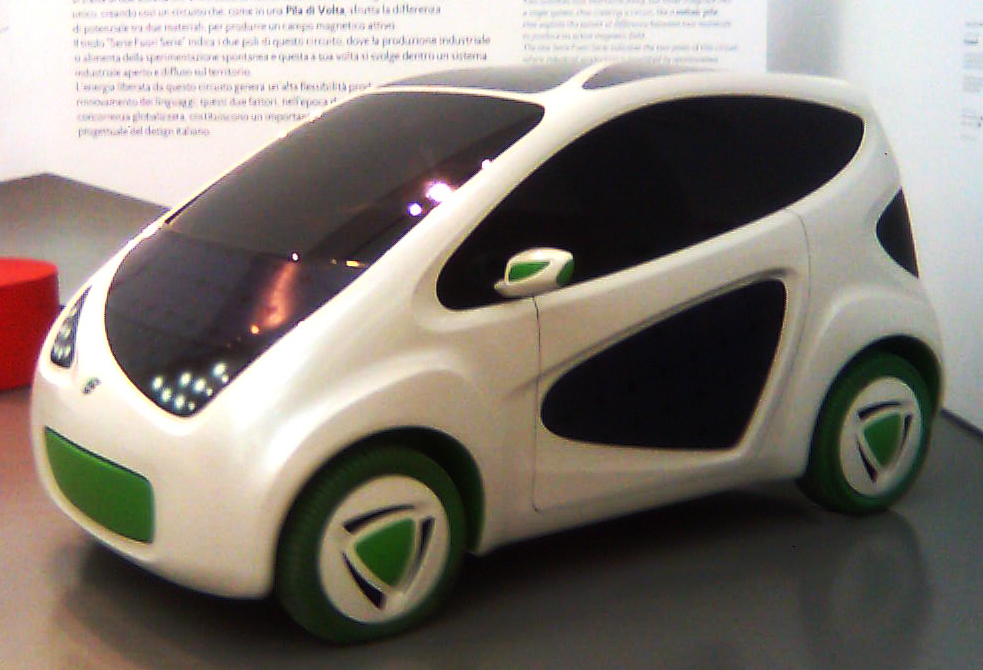 La citycar elettrica Fiat Phylla al TDM di Milano